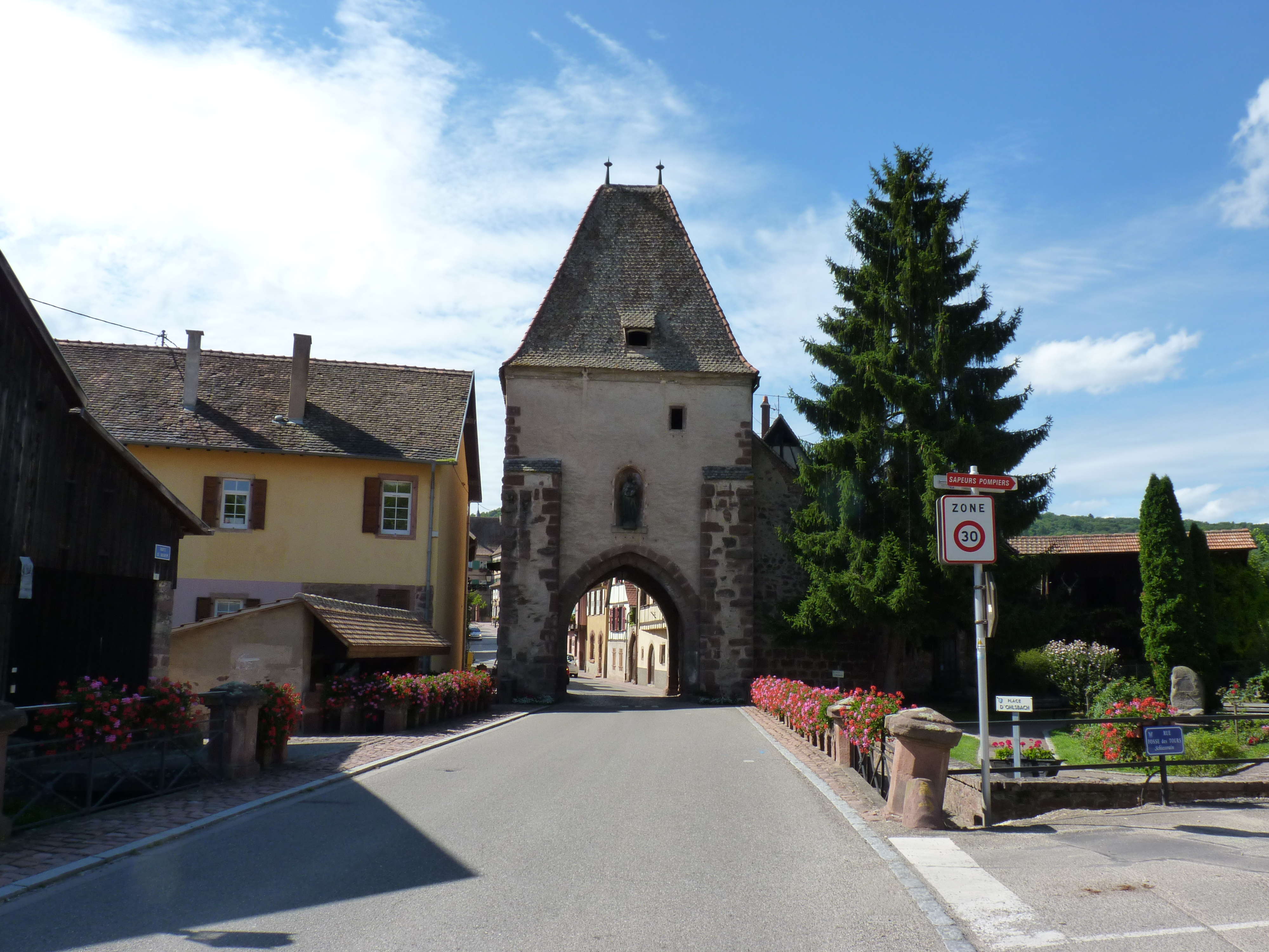 La tour basse,ou tour des remparts, à l'entrée ouest de la ville